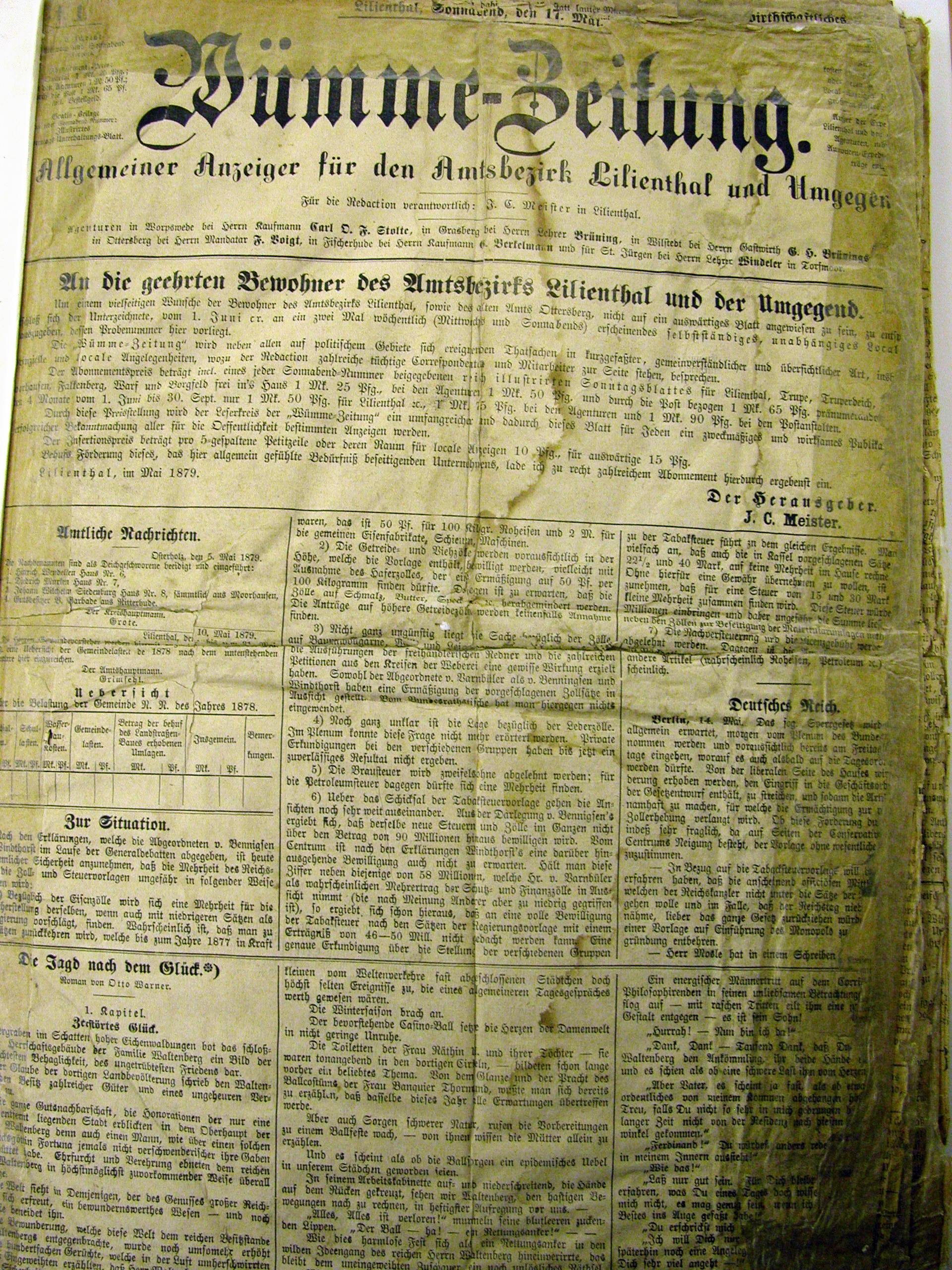 Die erste Ausgabe der Wümme-Zeitung.